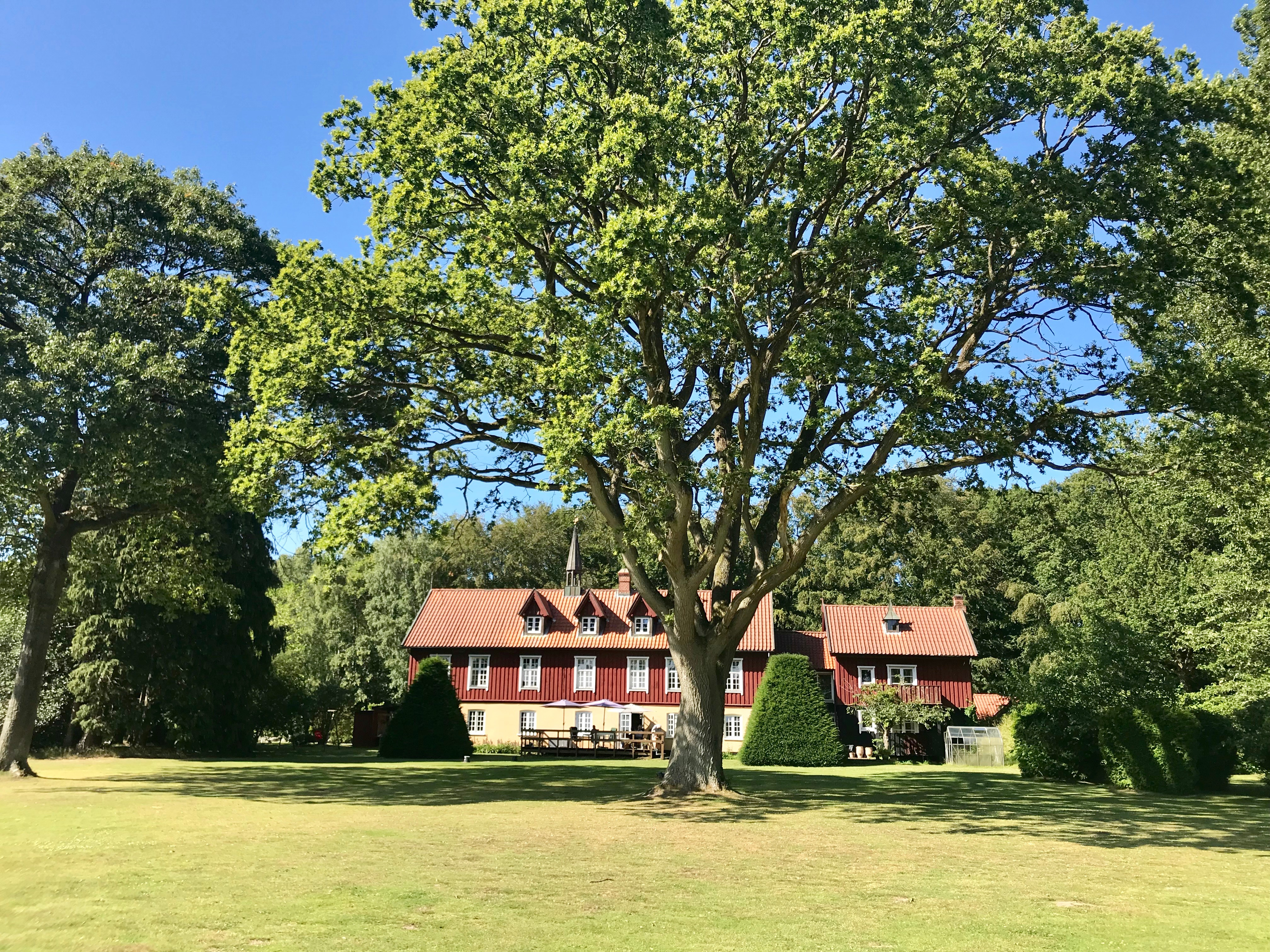 Photo of the main house